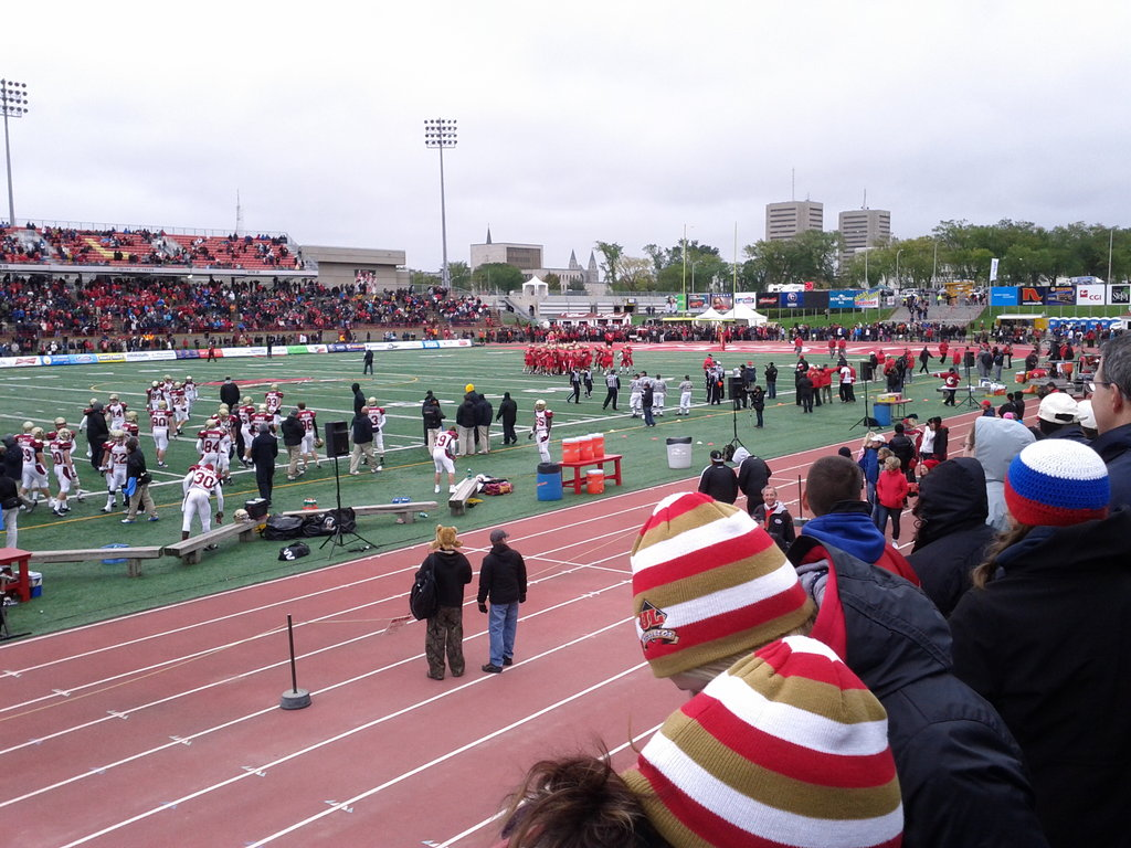 Match du Rouge et Or football à l'Université Laval (Québec, Québec, Canada) Rouge et Or football game at Laval University (Quebec City, Quebec, Canada)